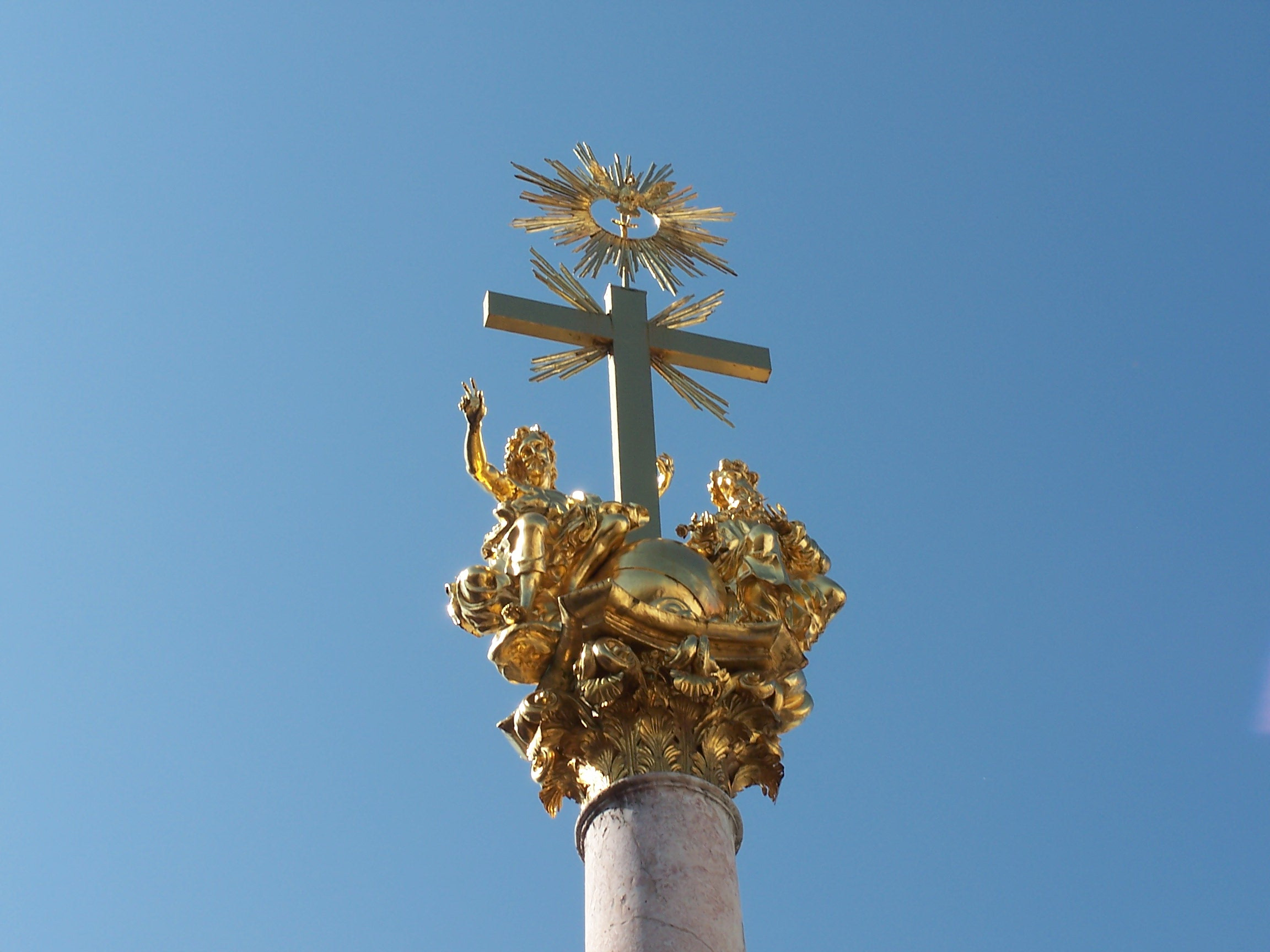 Straubing, Dreifaltigkeitssäule, barock, mit umgebender Balustrade, 1704-09; in der Platzmitte.